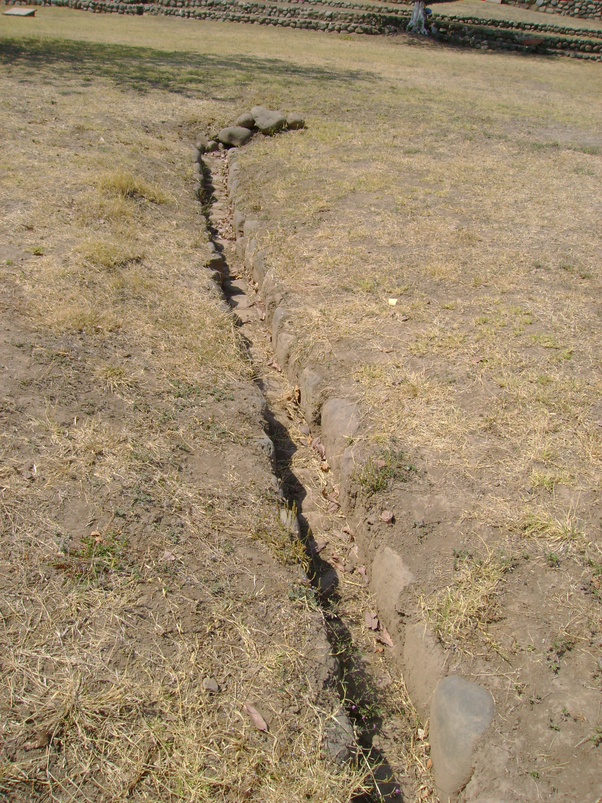 Drenaje Subterraneo de la Campana, en Colima